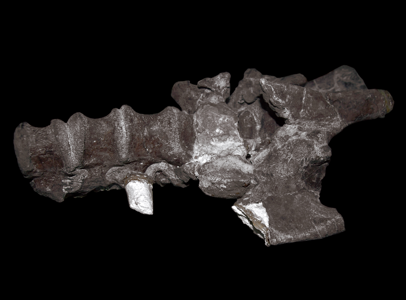 Babes Bolyai paleontology museum